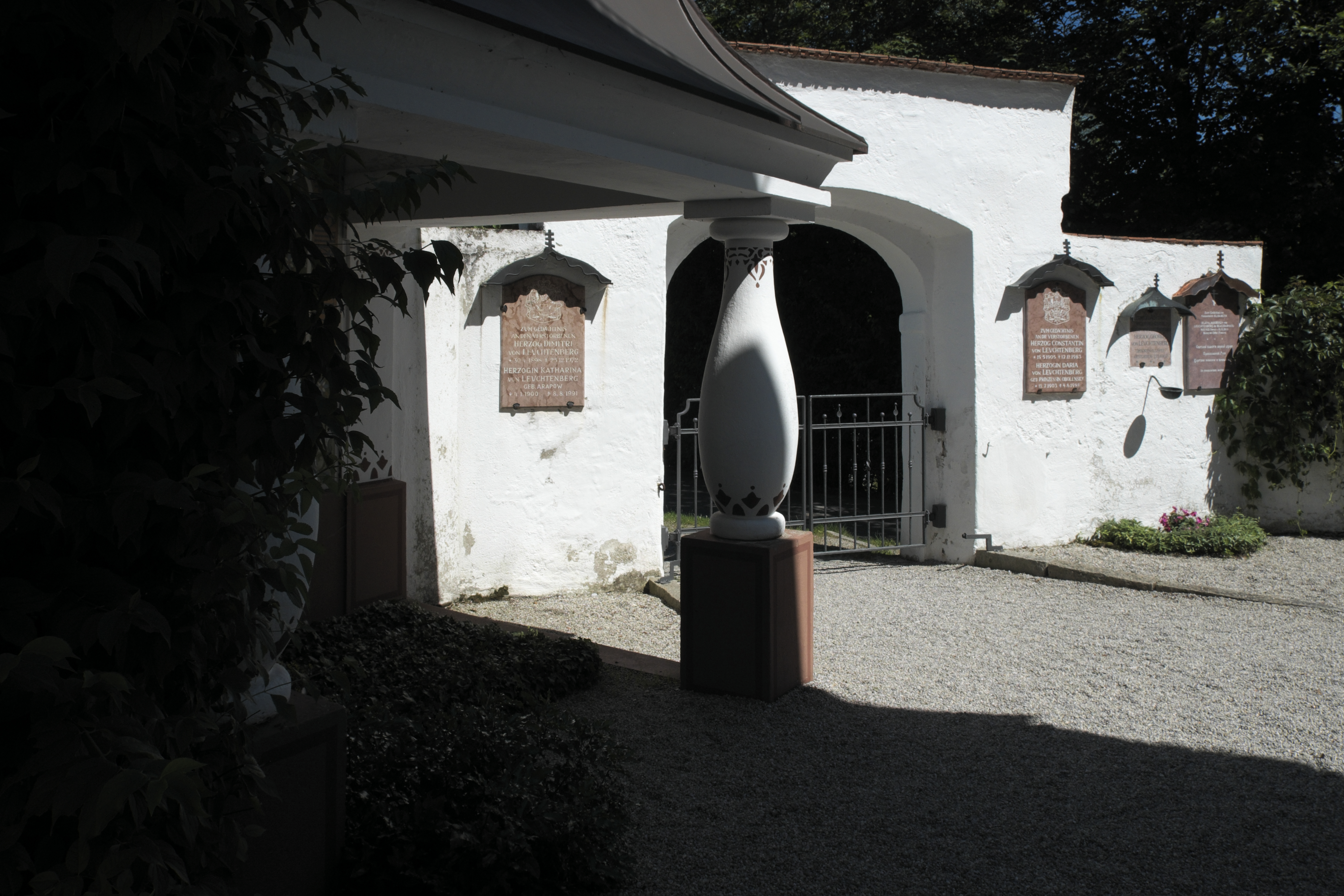 Friedhof an der ehemaligen Nebenkirche St. Walburgis in Seeon, einem Ortsteil von Seeon-Seebruck im Landkreis Traunstein (Bayern/Deutschland), Grabstätte der Familie von Leuchtenberg